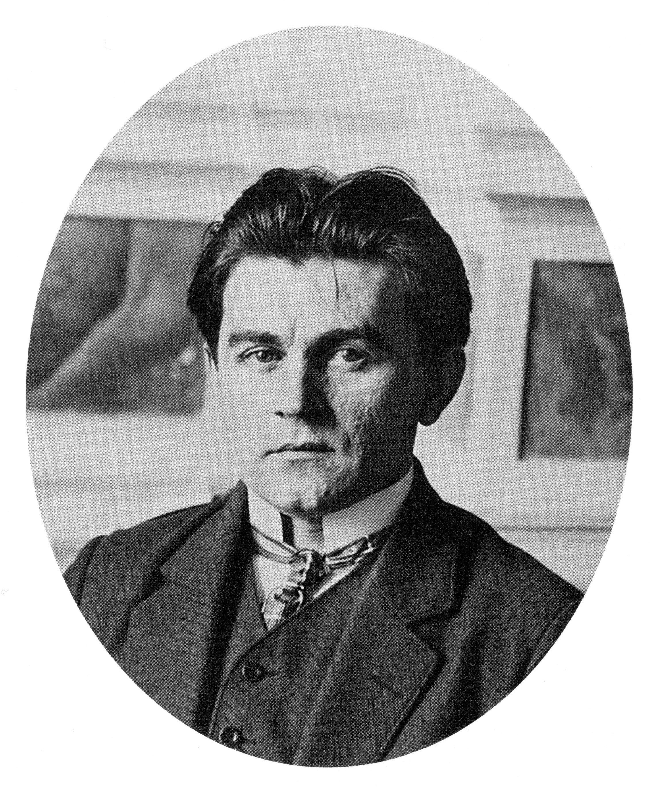 Фотография Казимира Малевича. Около 1912